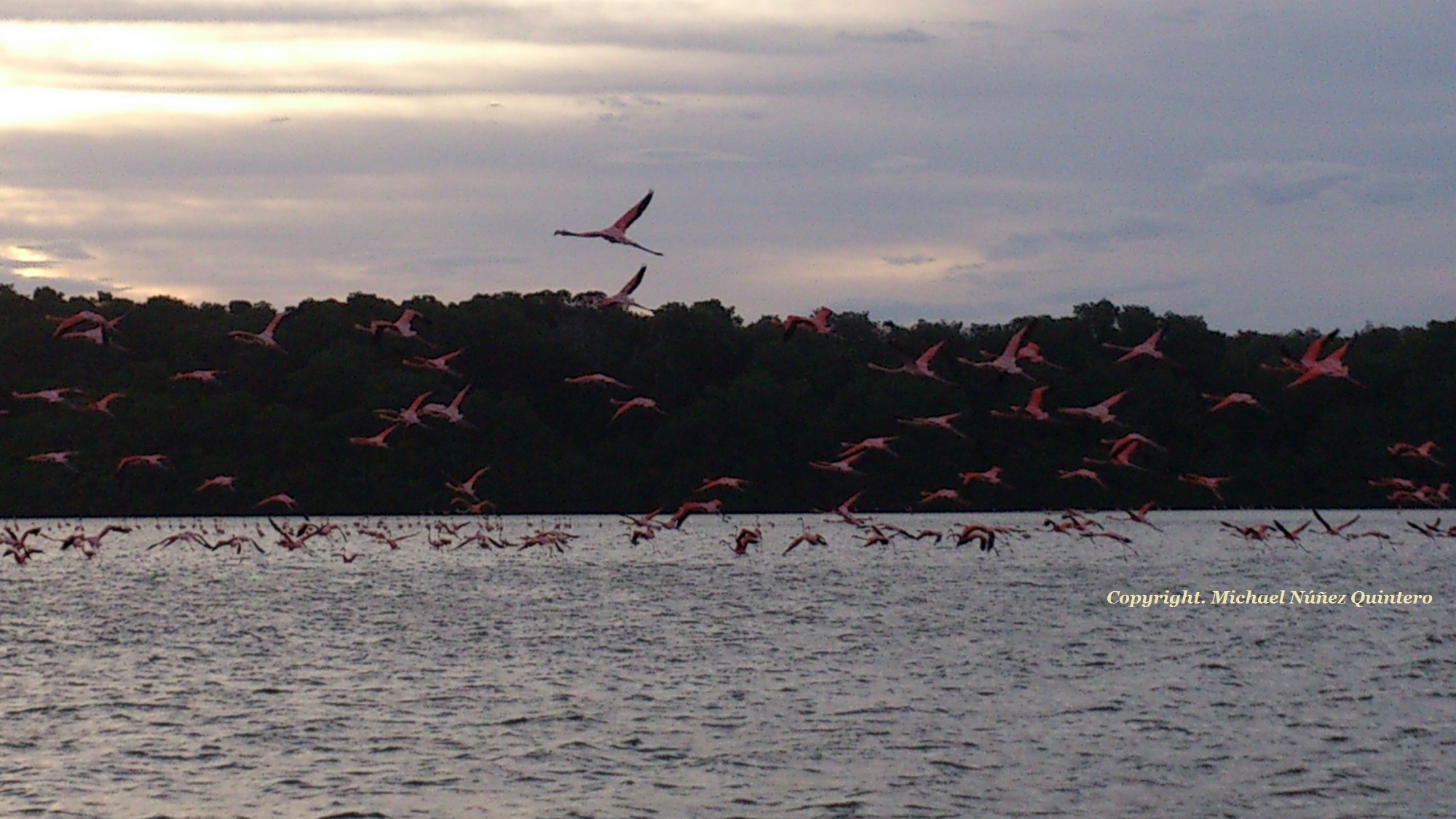 Con el despertar de la mañana y bien temprano los flamencos "residentes" comienzan su actividad rutinaria del día.